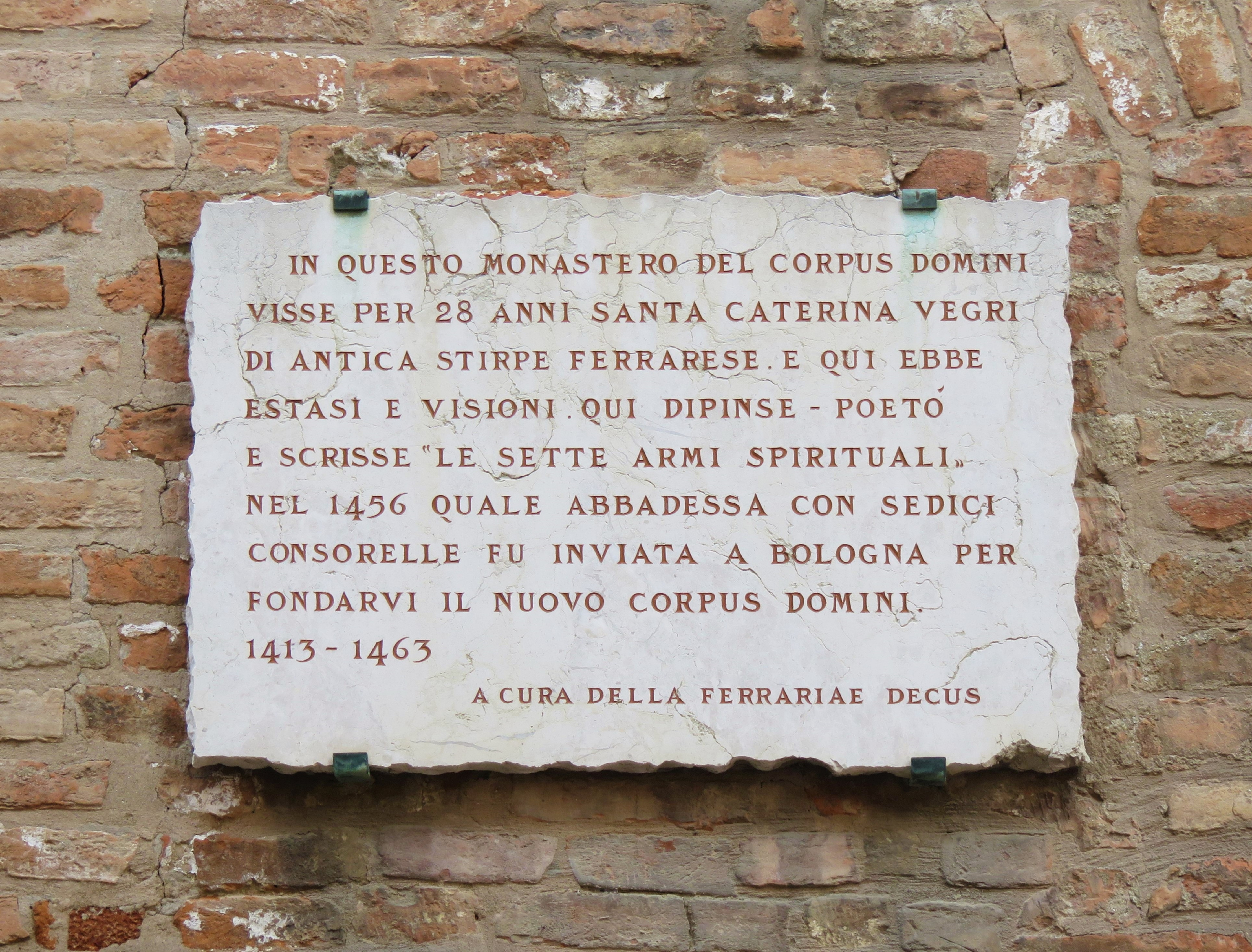 Epigrafe della Ferrariae Decus su Santa Caterina Vegri - Facciata esterna del convento in via Pergolato Testo: IN QUESTO MONASTERO DEL CORPUS DOMINI VISSE PER 28 ANNI SANTA CATERINA VEGRI DI ANTICA STIRPE FERRARESE. E QUI EBBE ESTASI E VISIONI. QUI DIPINSE - POETÓ E SCRISSE "LE SETTE ARMI SPIRITUALI" NEL 1456 QUALE ABBADESSA CON SEDICI CONSORELLE FU INVIATA A BOLOGNA PER FONDARVI IL NUOVO CORPUS DOMINI. 1413 - 1463 A CURA DELLA FERRARIAE DECUS